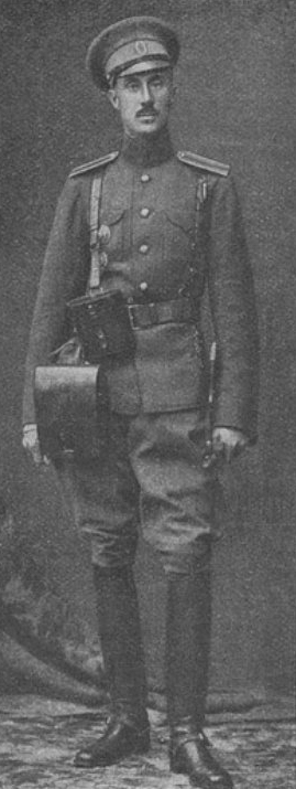 Барон Врангель, Пётр Николаевич, награжденный орденом Святого Георгия 4-й ст. в первые месяцы Первой мировой войны: Чин/звание: «Генерал-лейтенант» Знаки различия на картине: погоны «Ротмистр»Ротмистр.